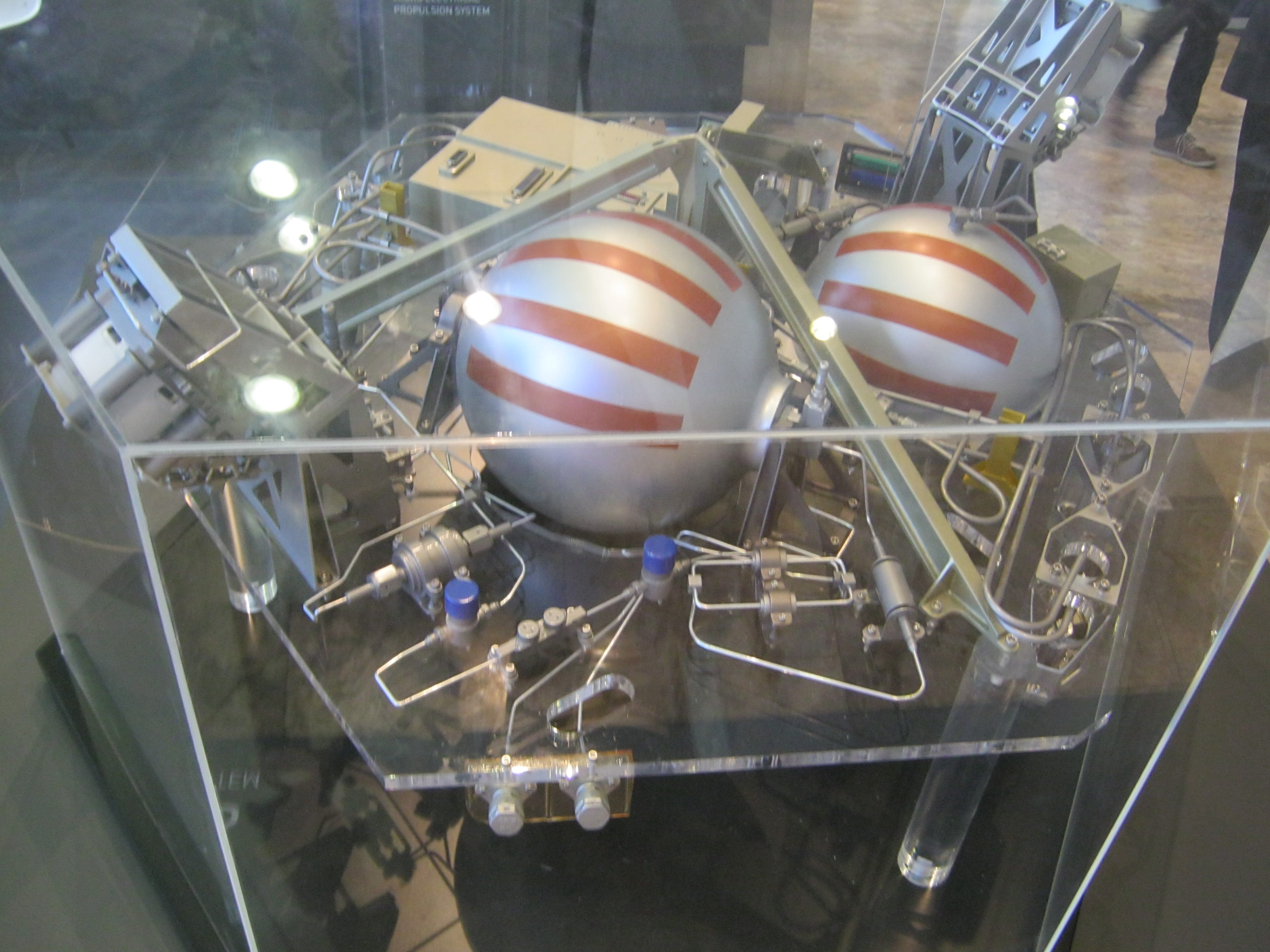 Hall effect thruster of spacecraft VENμS. IAC 2015